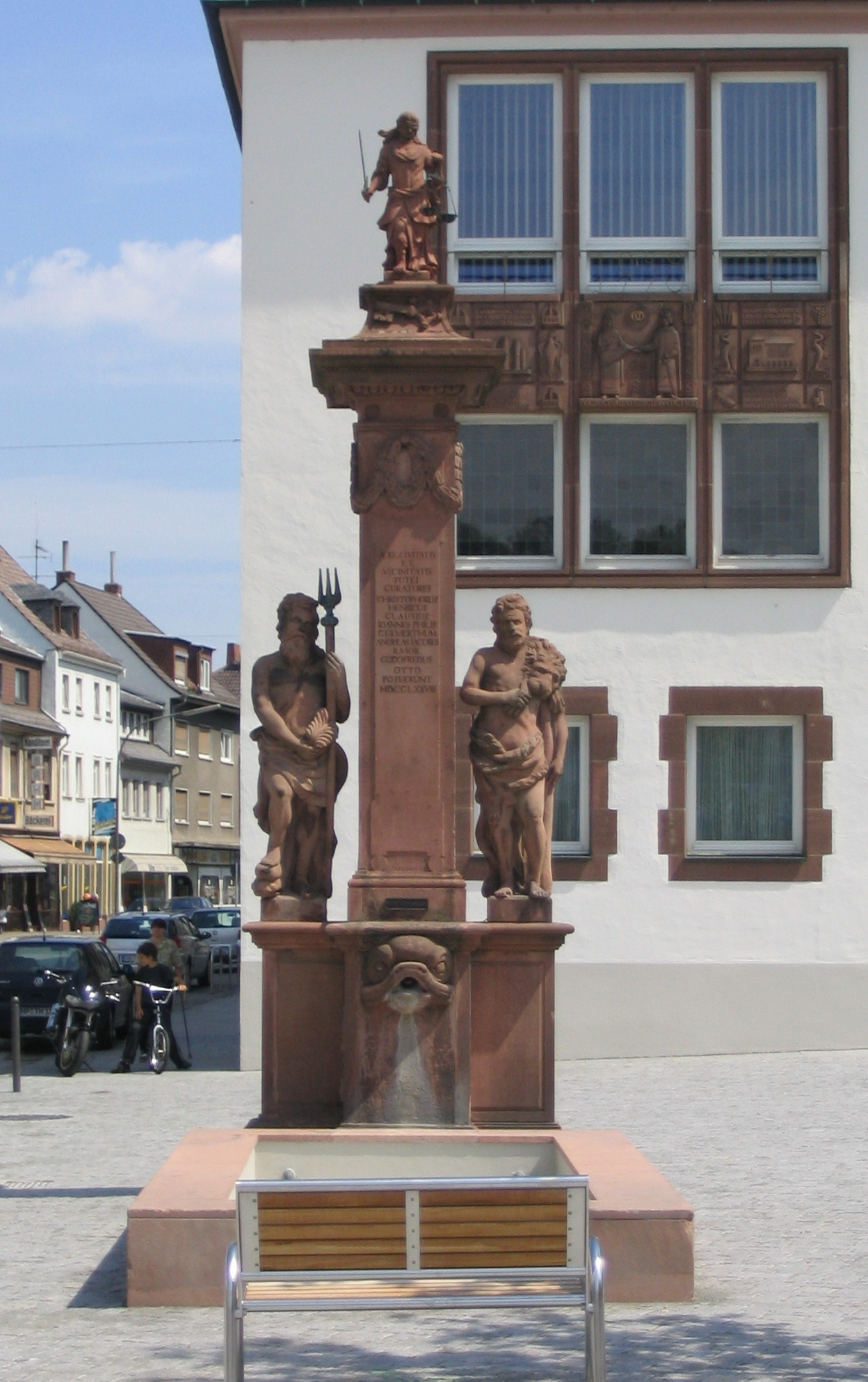 Worms, Gerechtigskeitsbrunnen auf dem Marktplatz (Original text: Worms: Win Brunnen am Rathaus)